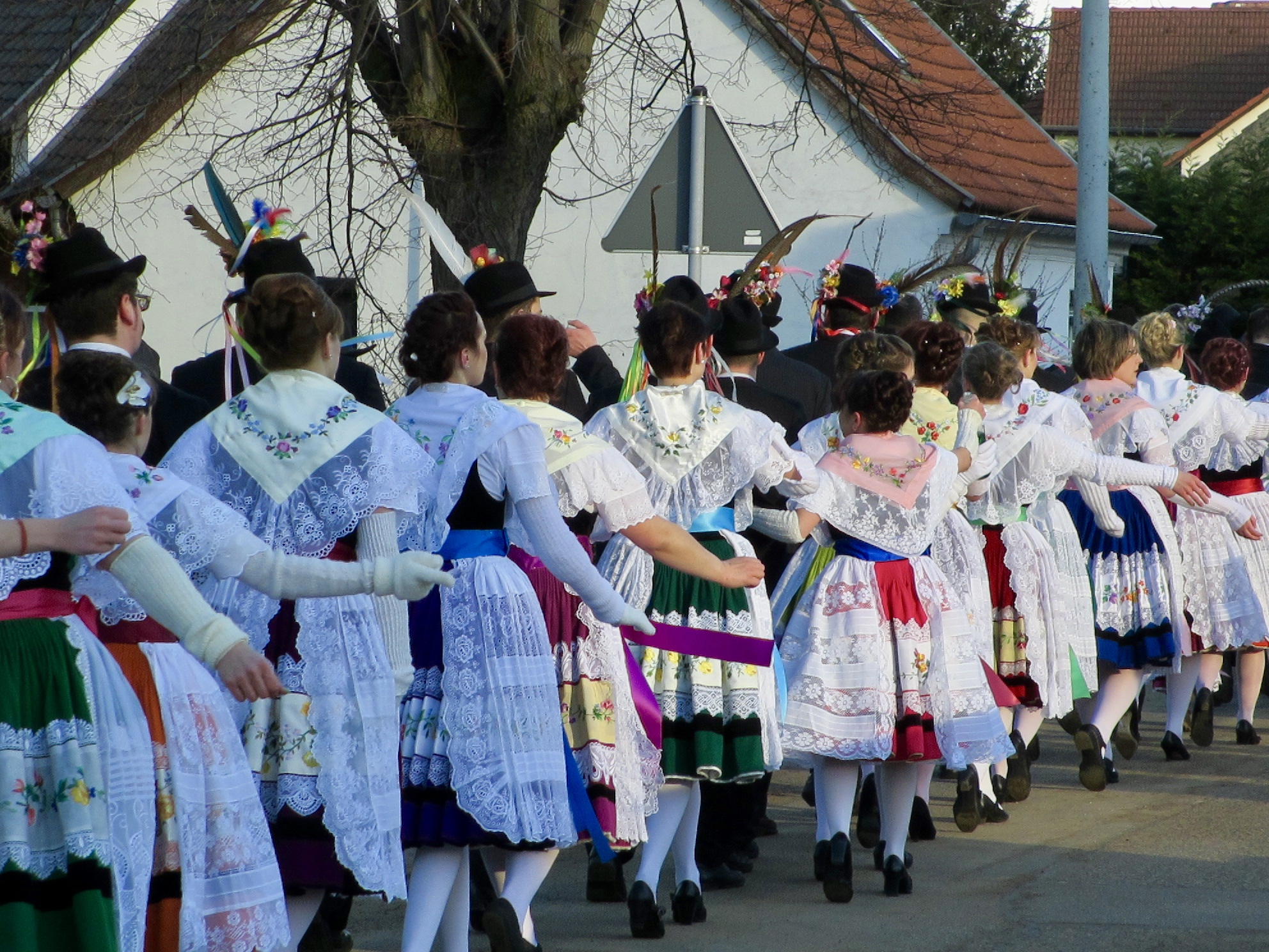 sorbisch/wendische Fastnacht